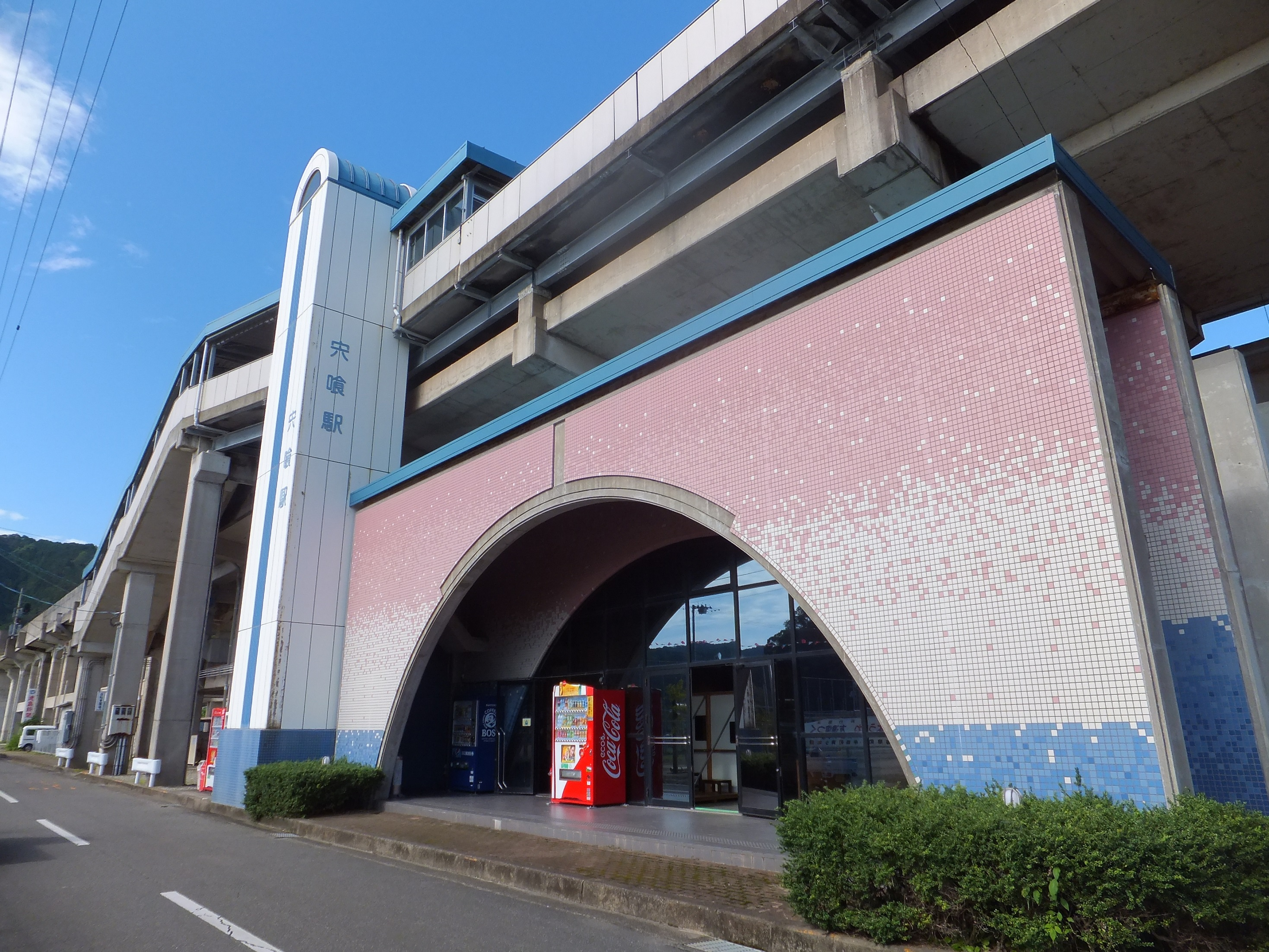 阿佐海岸鉄道 宍喰駅 （徳島県海部郡海陽町 2015年）